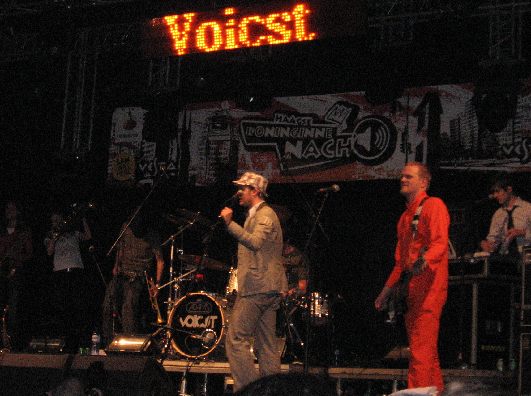 Voicst_-_Koninginnenach